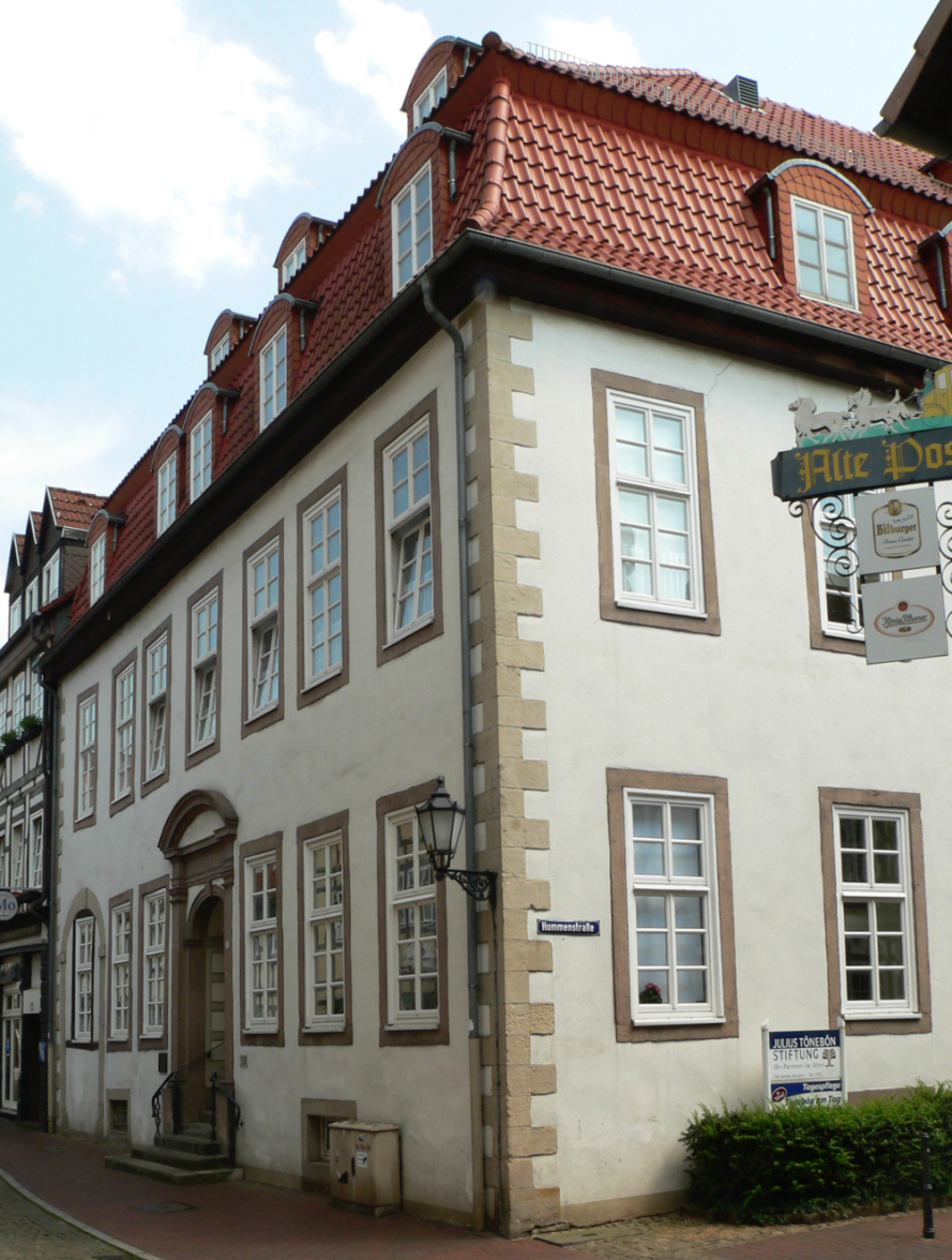 Hameln, Neue Marktstrasse 13, etwa 1940 bis 1942 als sogenanntes Judenhaus genutzt.